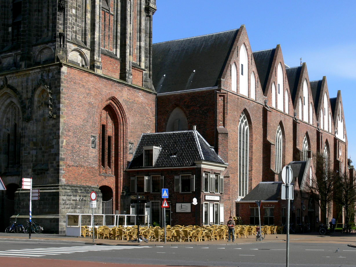 De voormalige kosterswoning van de Martinikerk in Groningen